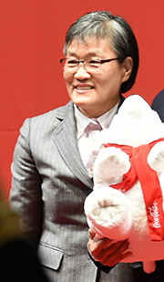 제19회 코카-콜라 체육대상 : 제2부